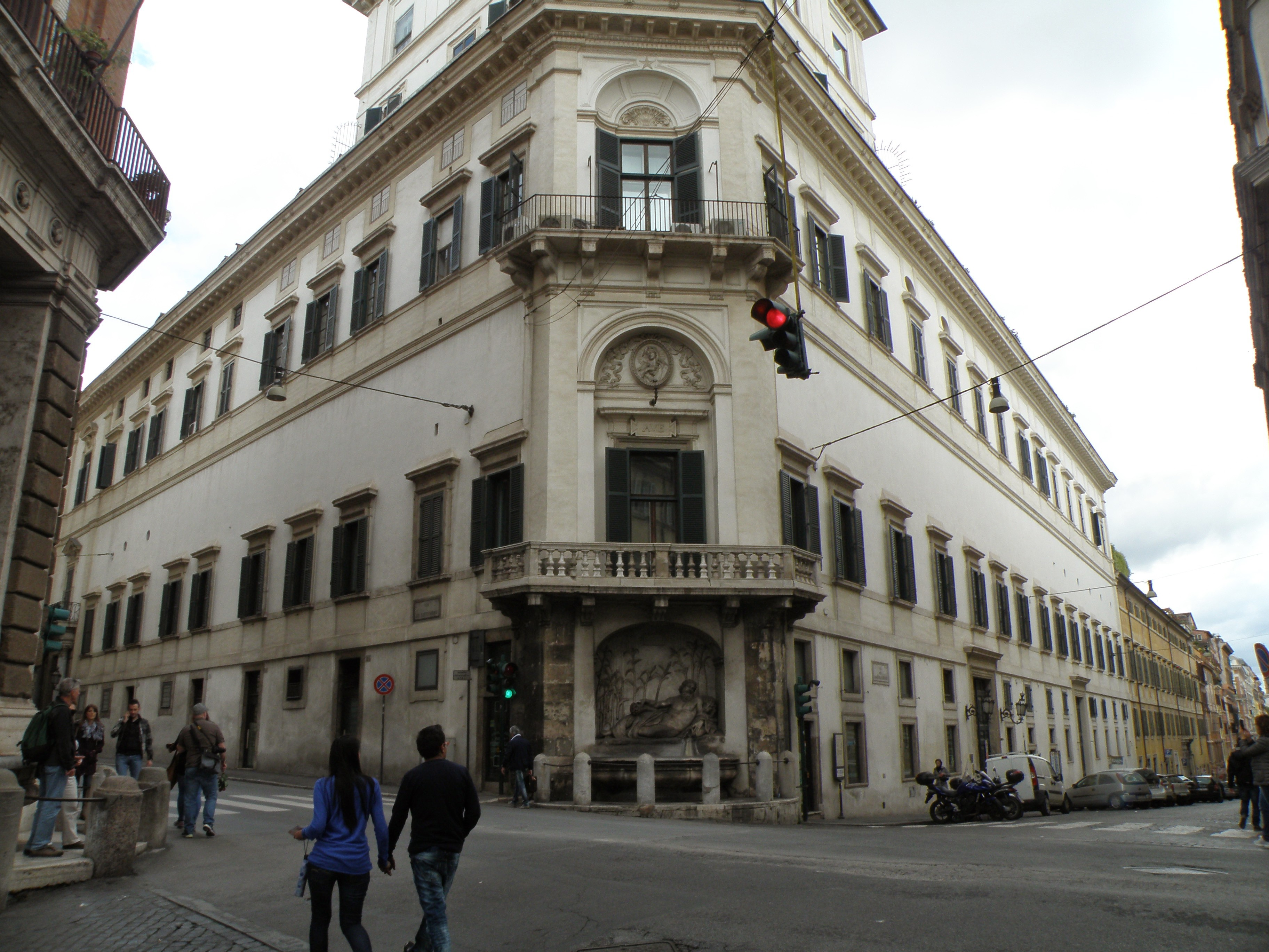 Rione XVIII Castro Pretorio, Roma, Italy